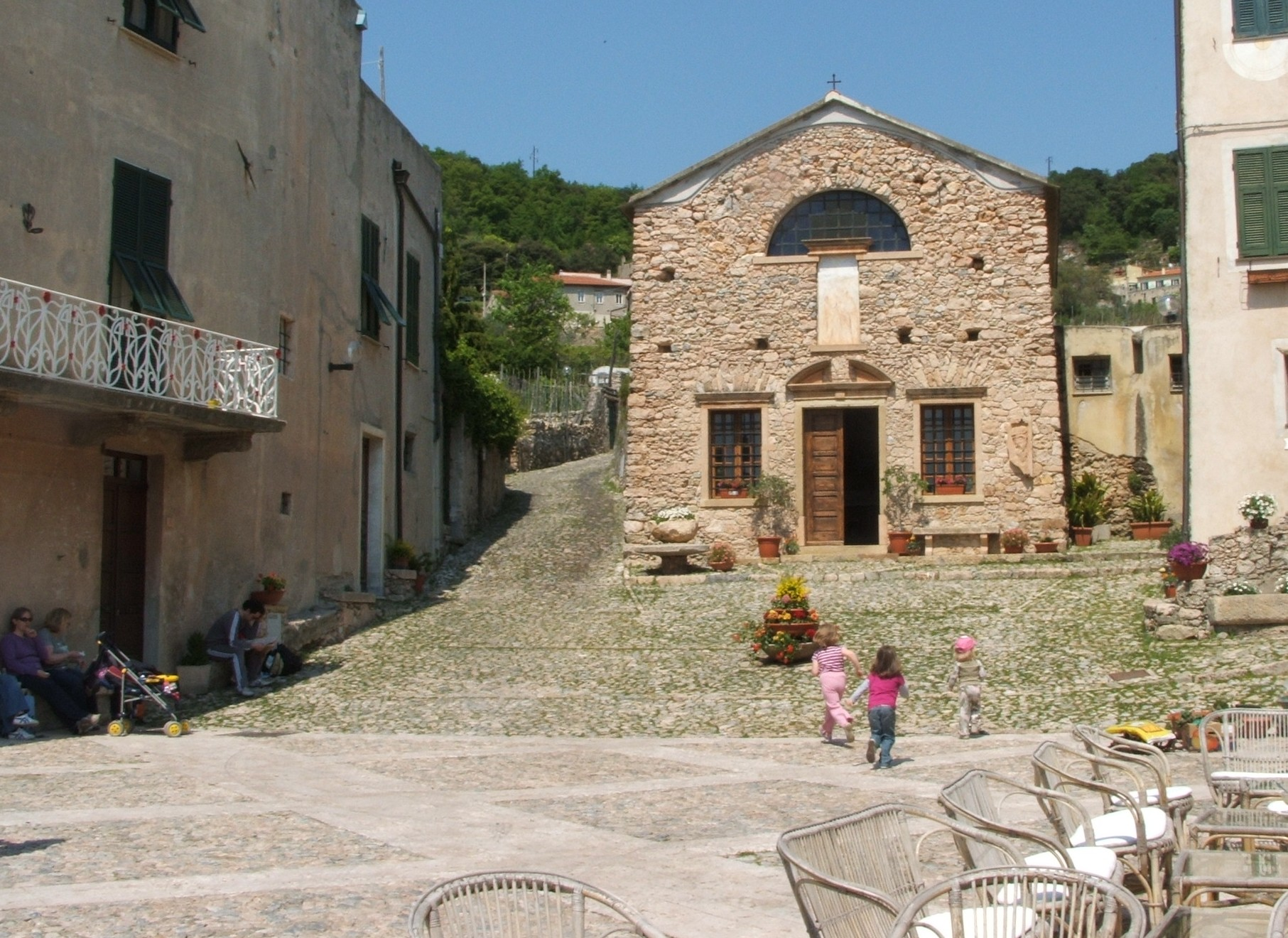 Verezzi (Borgio Verezzi, Savona, Liguria) - piazza S.Agostino sede del Festival teatrale estivo